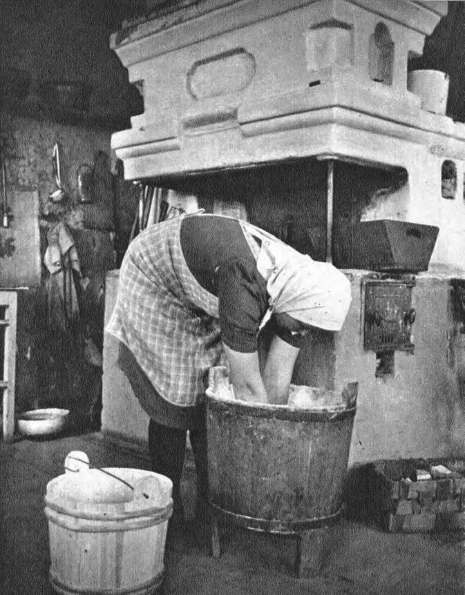 Изготовление домашнего ржаного хлеба. Деревня Мертвицы (Кулла), прихода Калливиере (Эстонская Ингерманландия).